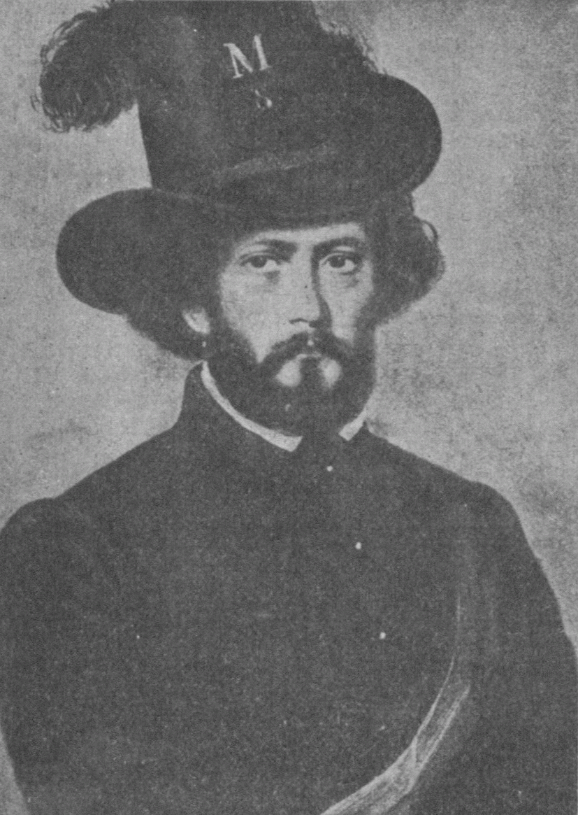 Ludwig August Frankl Ritter von Hohenwart (1810-1894) als Legionär im Jahre 1848